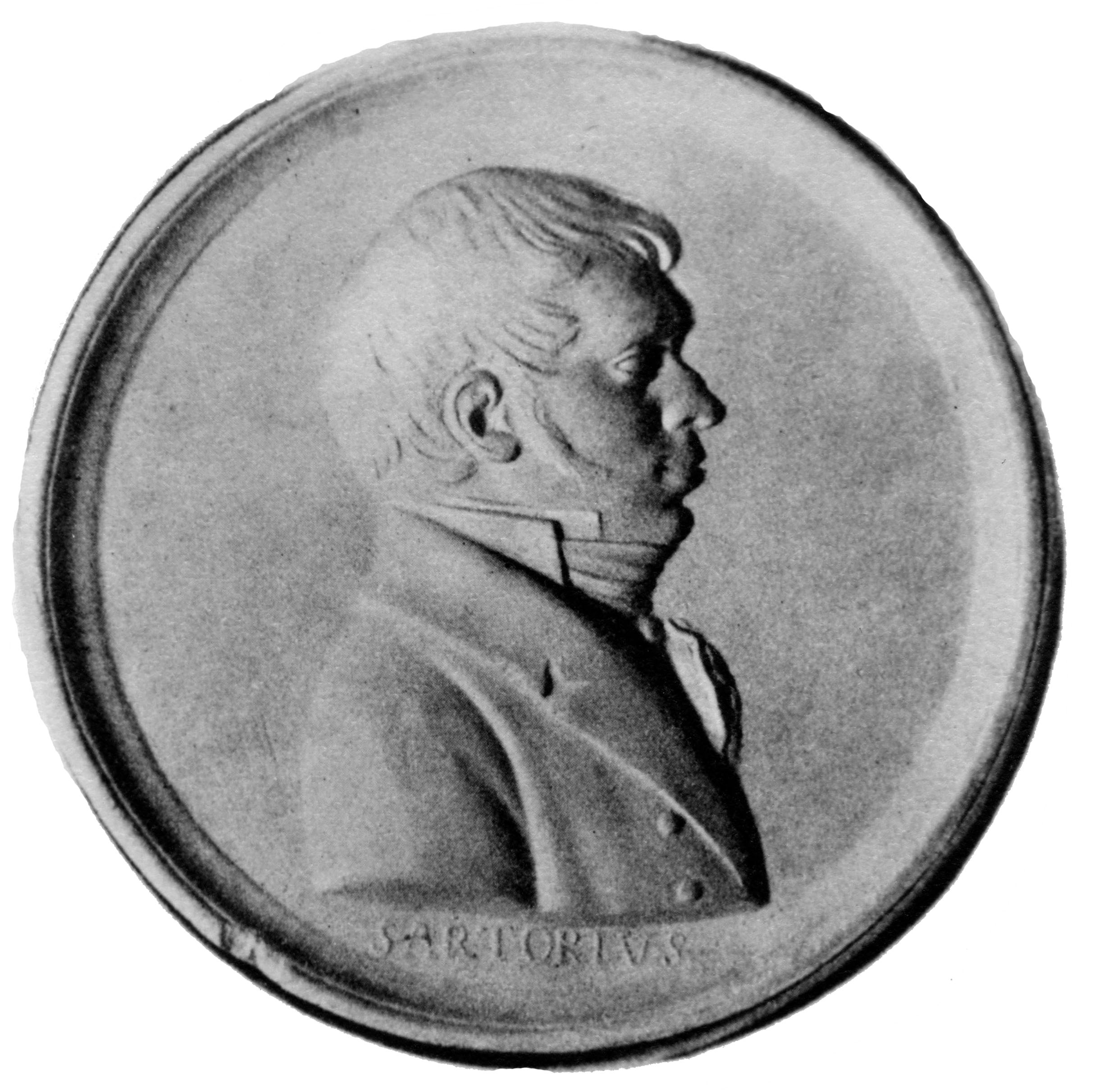 Image of George Sartorius (later Sartorius von Waltershausen)